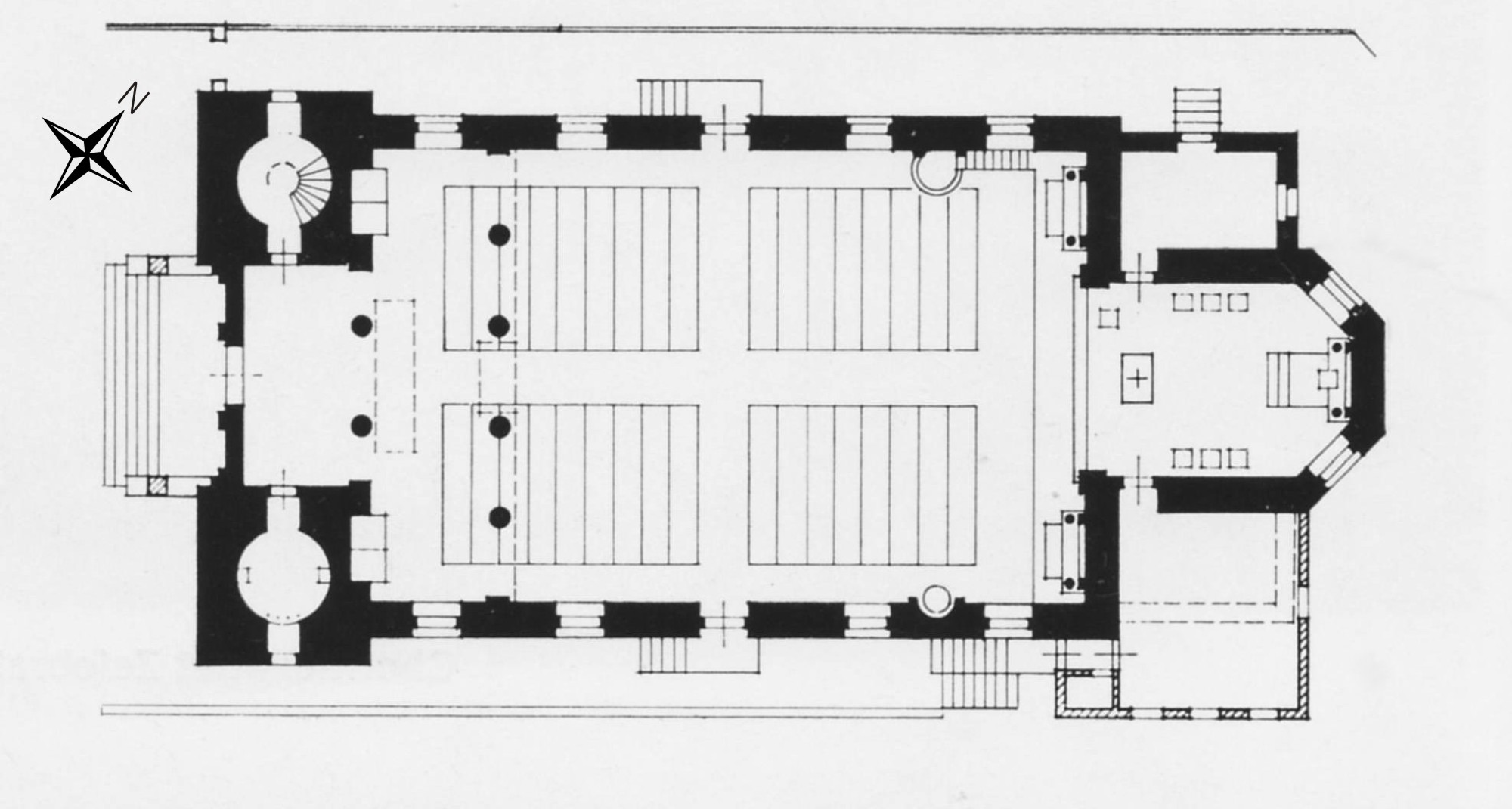 Grundriss der Fridolinskirche in Lörrach-Stetten